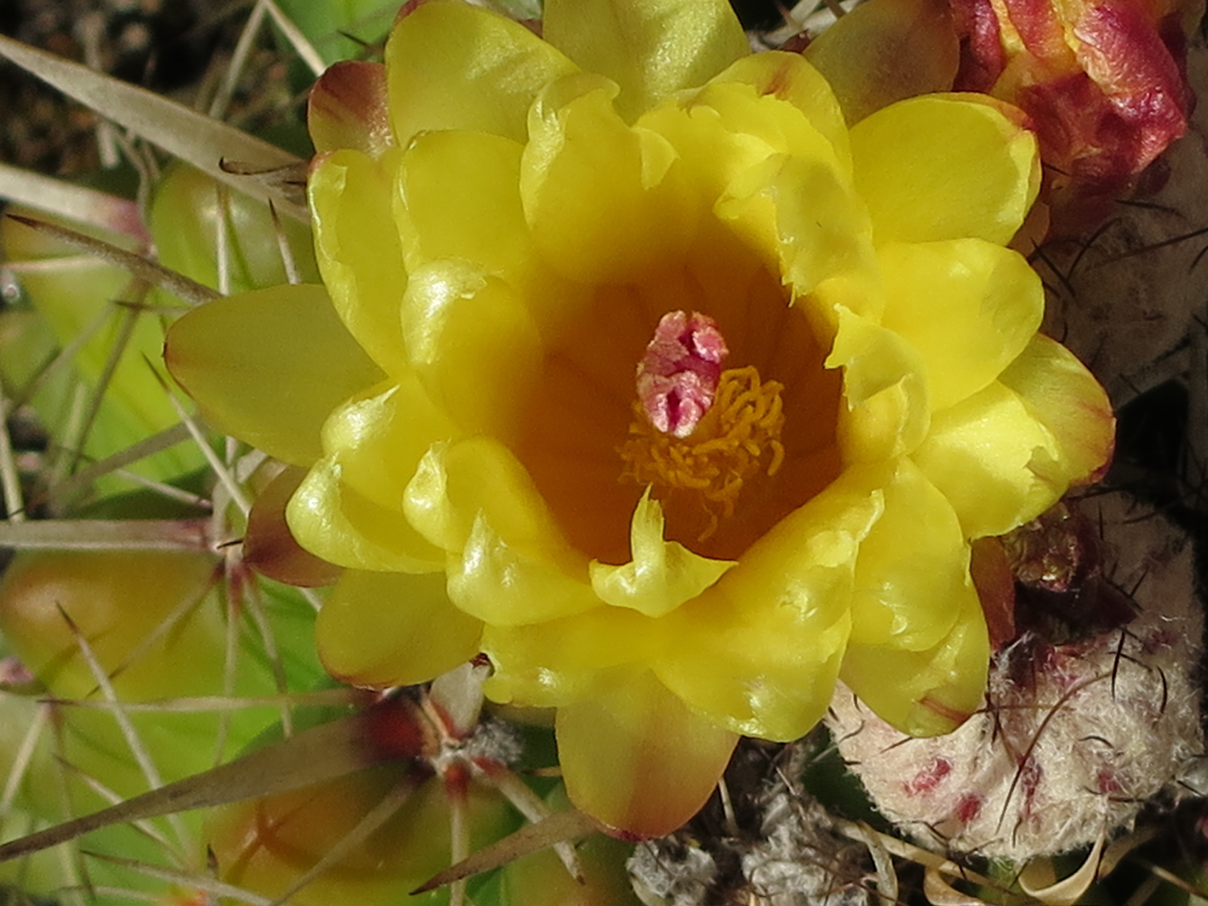 Il fiore della parodia sumammulosa